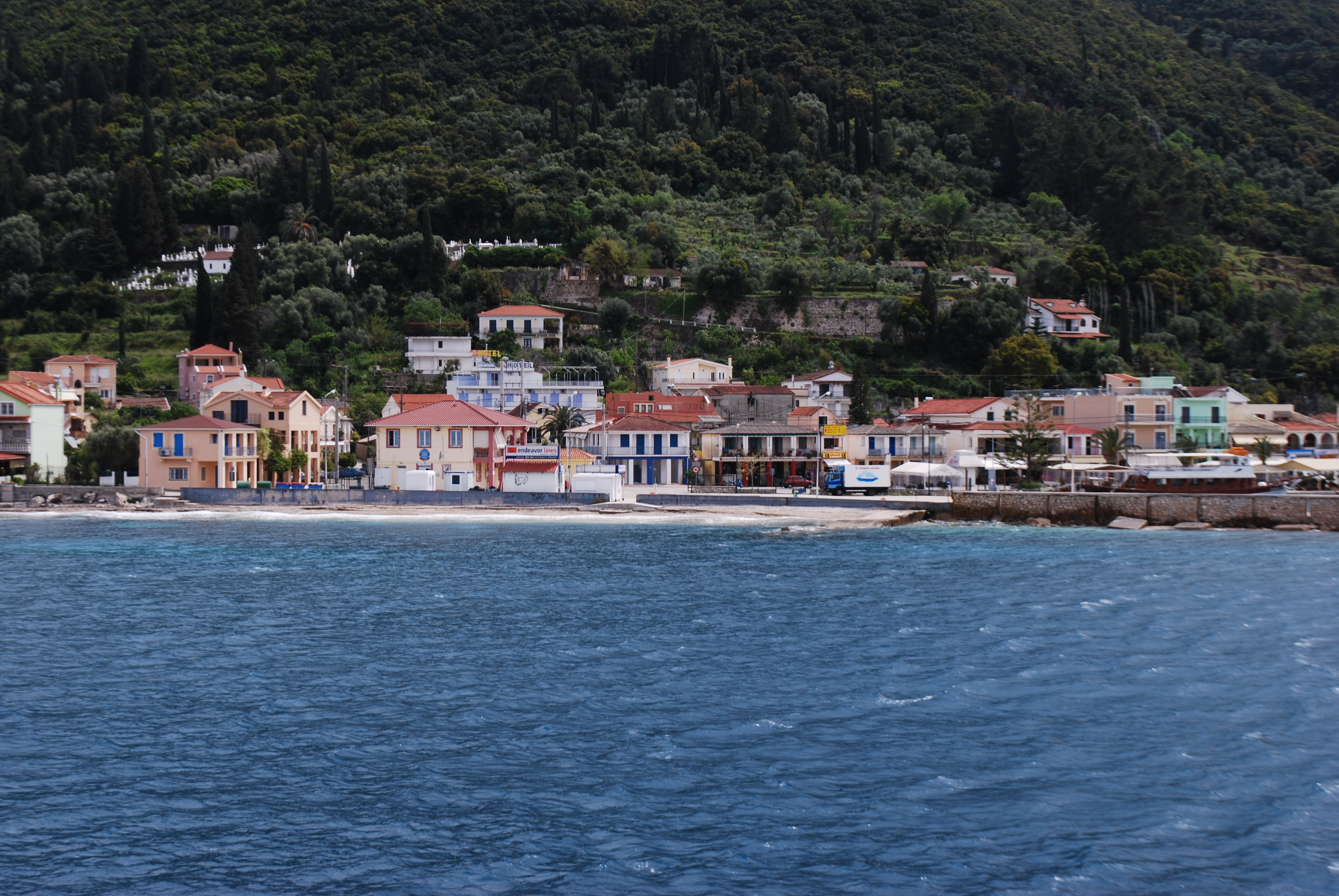 Vue de la traversée de Pisaetos (Ithaki) à Sami (Kephalonia), à bord du ferry "Ionion Pelagos".